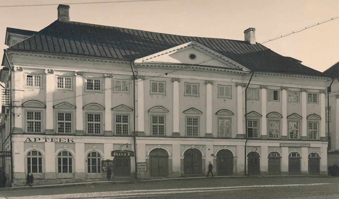 Narva, Raekoja plats, börsihoone (1695 - 1704 J. G. Heroldt) Pöördel tekst: Eesti / Narva. Mörsimaja. (Arhit. Herold, 1691). - Börsenhaus. Seeria "Kaunis kodumaa" Nr. 561 Foto Joh. Triefeldt, Rakvere, 1936 Pikk tn. 17-a. - Järeltrükk keelatud ( eesti)